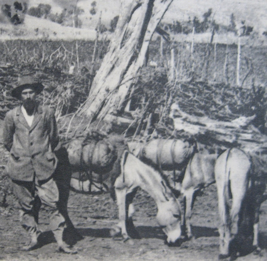 Henry de Monfreid en tournée dans la chaîne de montagne du Tchercher qui s'étend à l'ouest de Dire Daoua vers Addis Abeba, Éthiopie. Monfreid achète du café et des peaux pour le compte de son employeur, la Maison Guigniony. Il ne portera plus jamais la barbe après son installation à Djibouti en 1913. Photo de 1911 ou 1912, photographe inconnu.